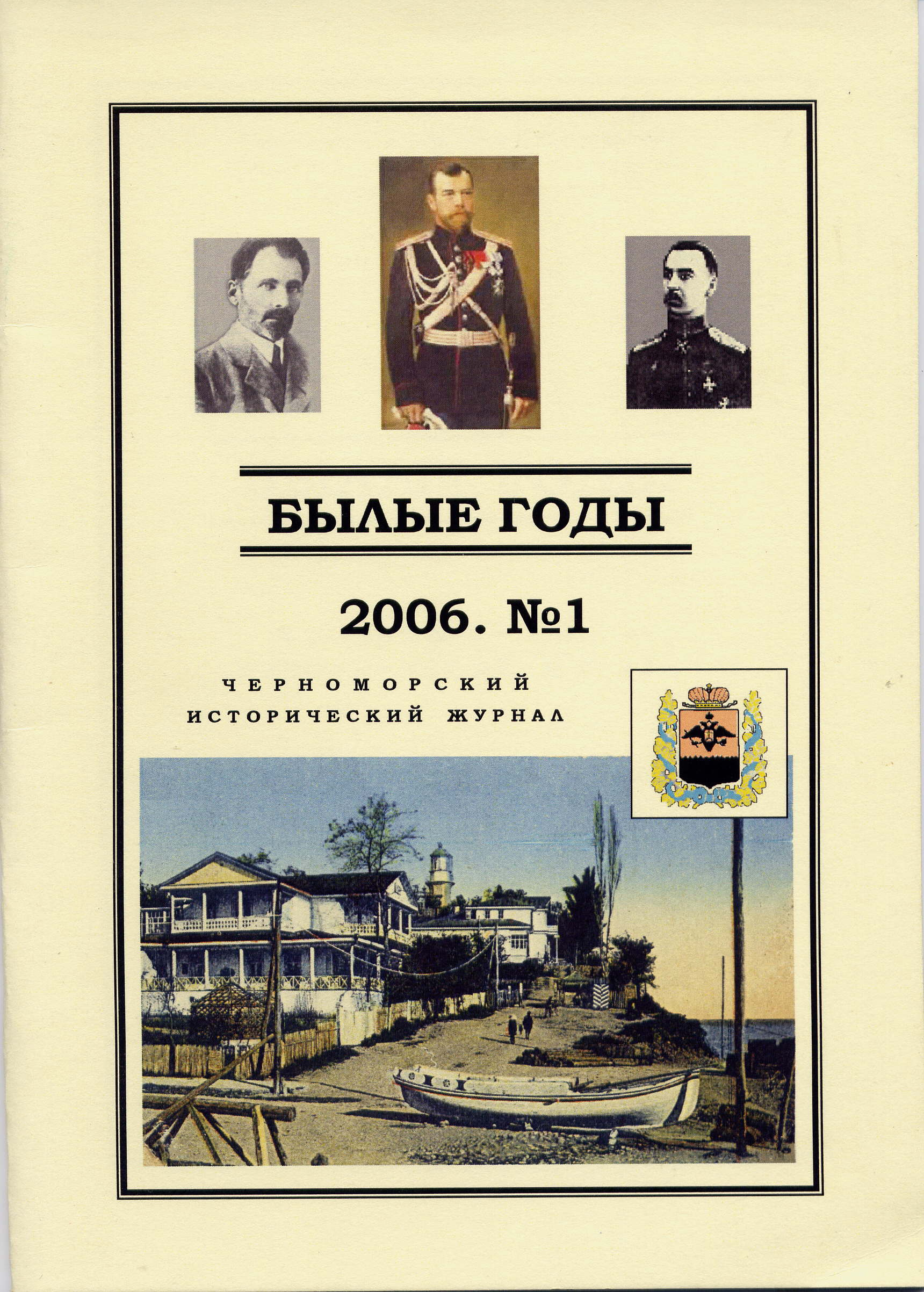 Обложка журнала "Былые годы", СГУТиКД, Сочи, Россия